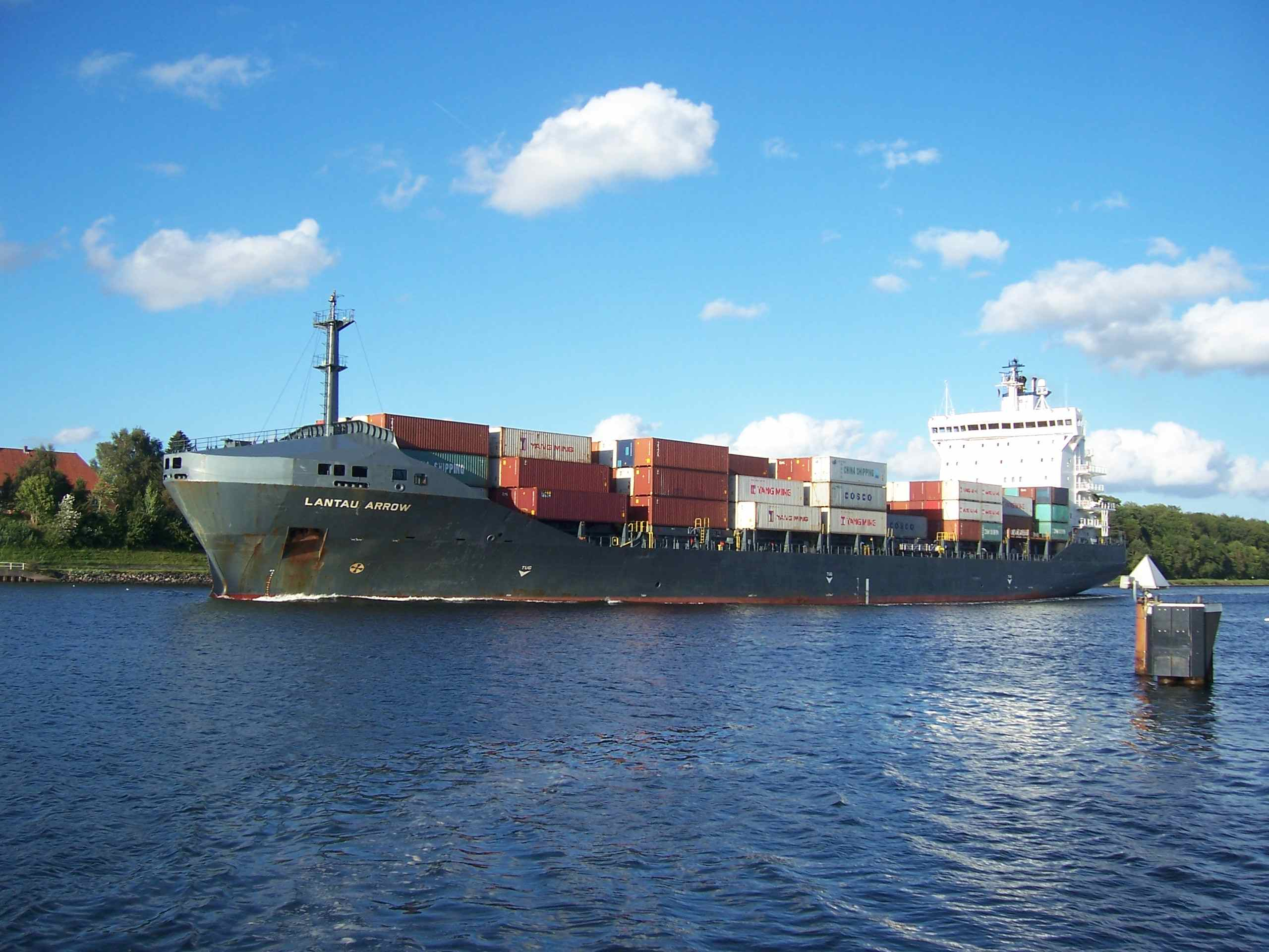 Lantau Arrow Sehestedt NOK